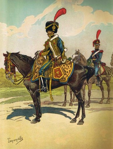 Artillerie à cheval de la Garde